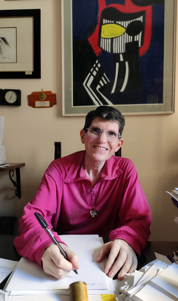 La Poetessa Sara Ciampi nel suo studio foto di Giugno 2020